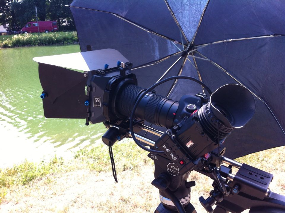 5DII als Video-DSLR